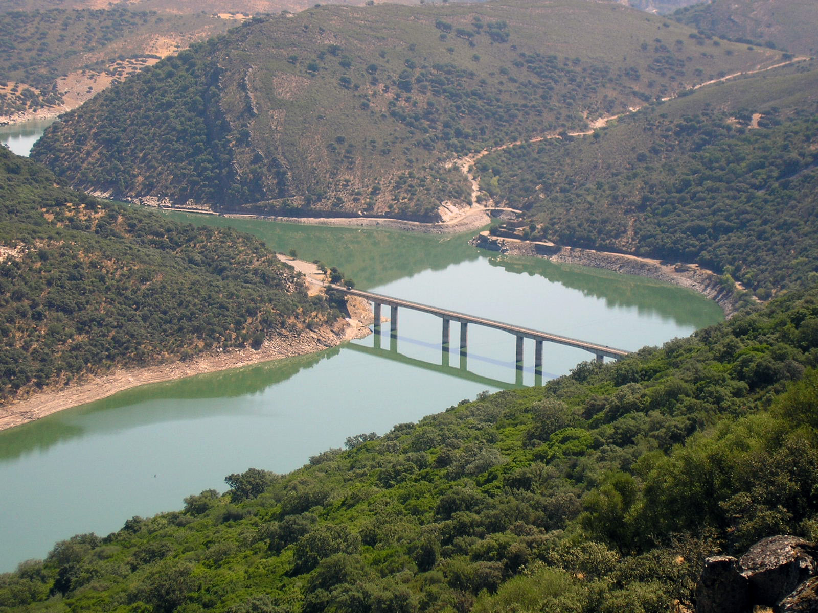 Sicilianu: Parcu di Monfragüe n Estremadura (Spagna)